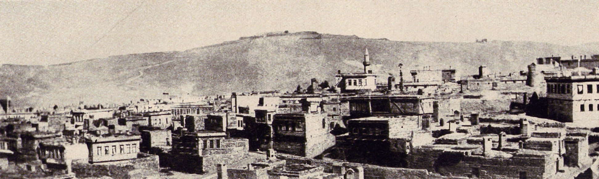 Festung Erzerum, Türkei, um 1910